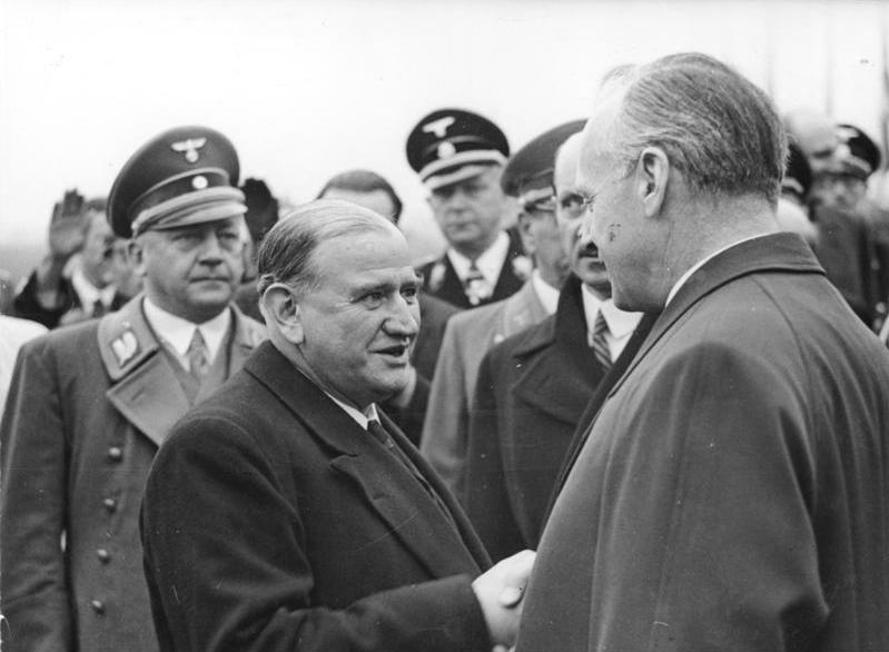 Scherl: Die Abreise der ausländischen Staatsmänner von München. Der französische Ministerpräsident verabschiedet sich auf dem Flughafen Oberwiesenfeld von Reichsaussenminister v. Ribbentrop, links Gauleiter Adolf Wagner. [II. TEXT] ADN-Zentralbild/Archiv Das Münchener Abkommen vom 29./30.9.1938 Das am 29./30.9. geschlossene Abkommen zwischen dem britischen Ministerpräsidenten Arthur Neville Chamberlain, dem französischen Ministerpräsidenten Edouard Daladier, dem italienischen Staatschef Benito Mussolini und Adolf Hitler ermöglichte Deutschland die durch den Versailler Vertrag tschechisch annektierten deutschen Gebiete wieder unter deutsche Hoheit zurückzuführen. UBz: Min.-Präs. Daladier verabschiedet sich am 30.9. auf dem Münchener Flughafen Oberwiesenfeld vom Reichsaußenminister Joachim von Ribbentrop (rechts); links der Gauleiter der NSDAP und bayr. Staatsminister Adolf Wagner.